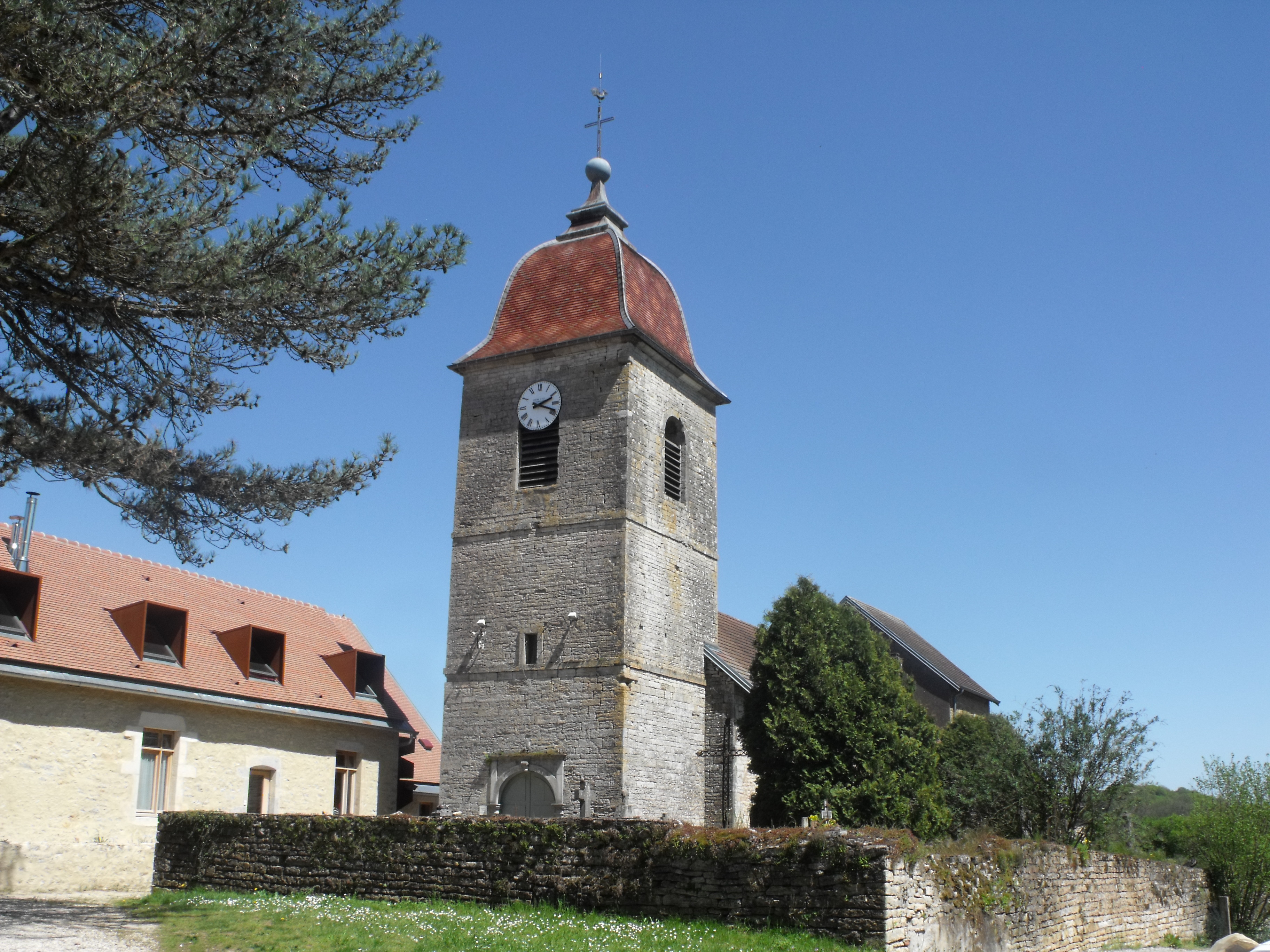 Eglise de Lantenne-Vertiere, Doubs, France